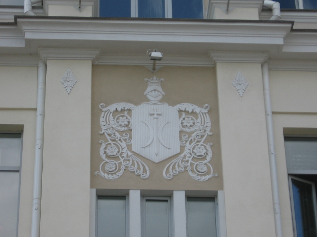 Беларуская (тарашкевіца): Герб «Астоя» на будынку па пр. Незалежнасьці, Менск